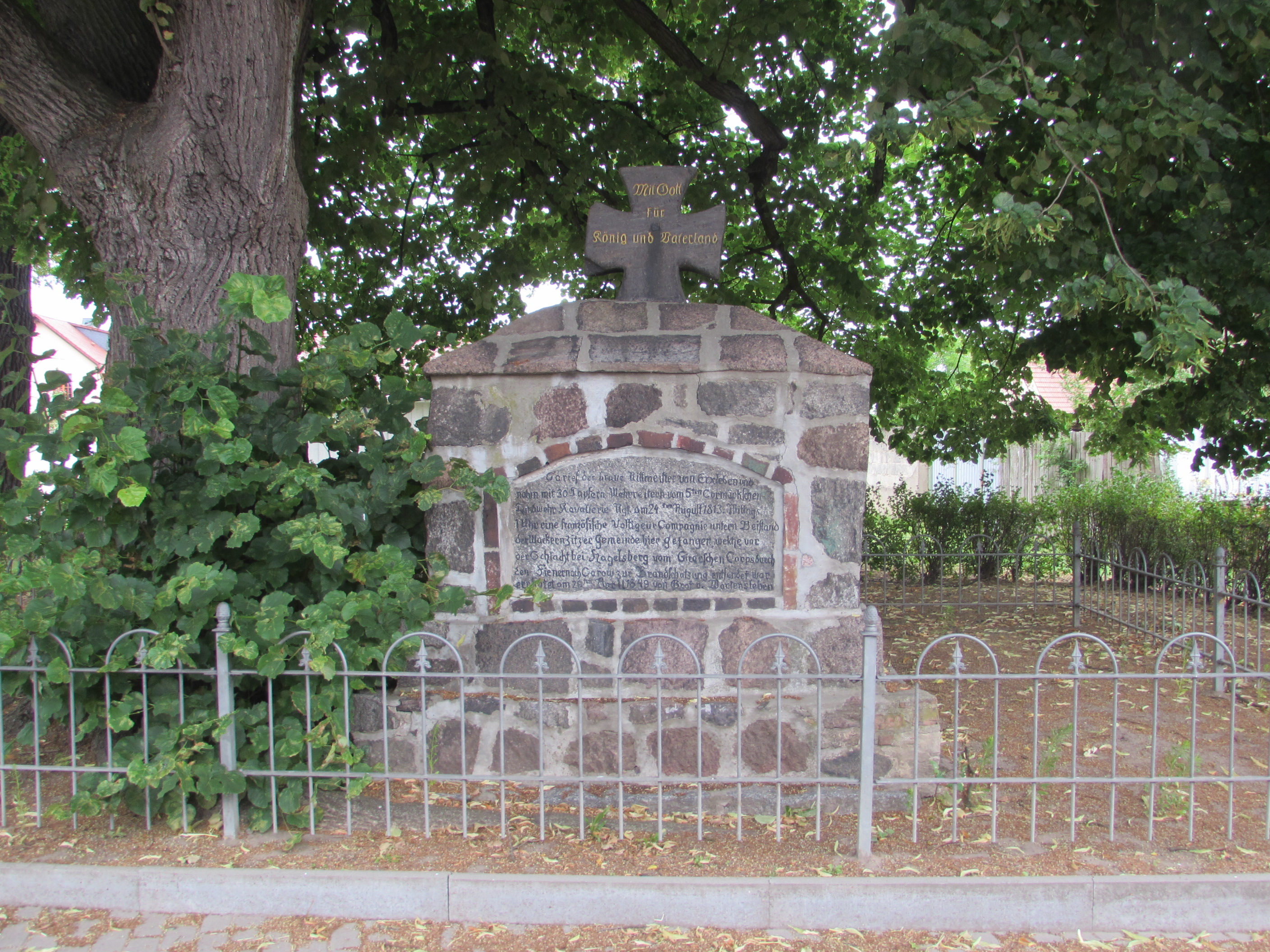 Denkmal in Zitz zu Ehren der Kämpfe in den Befreiungskriegen im Dorf